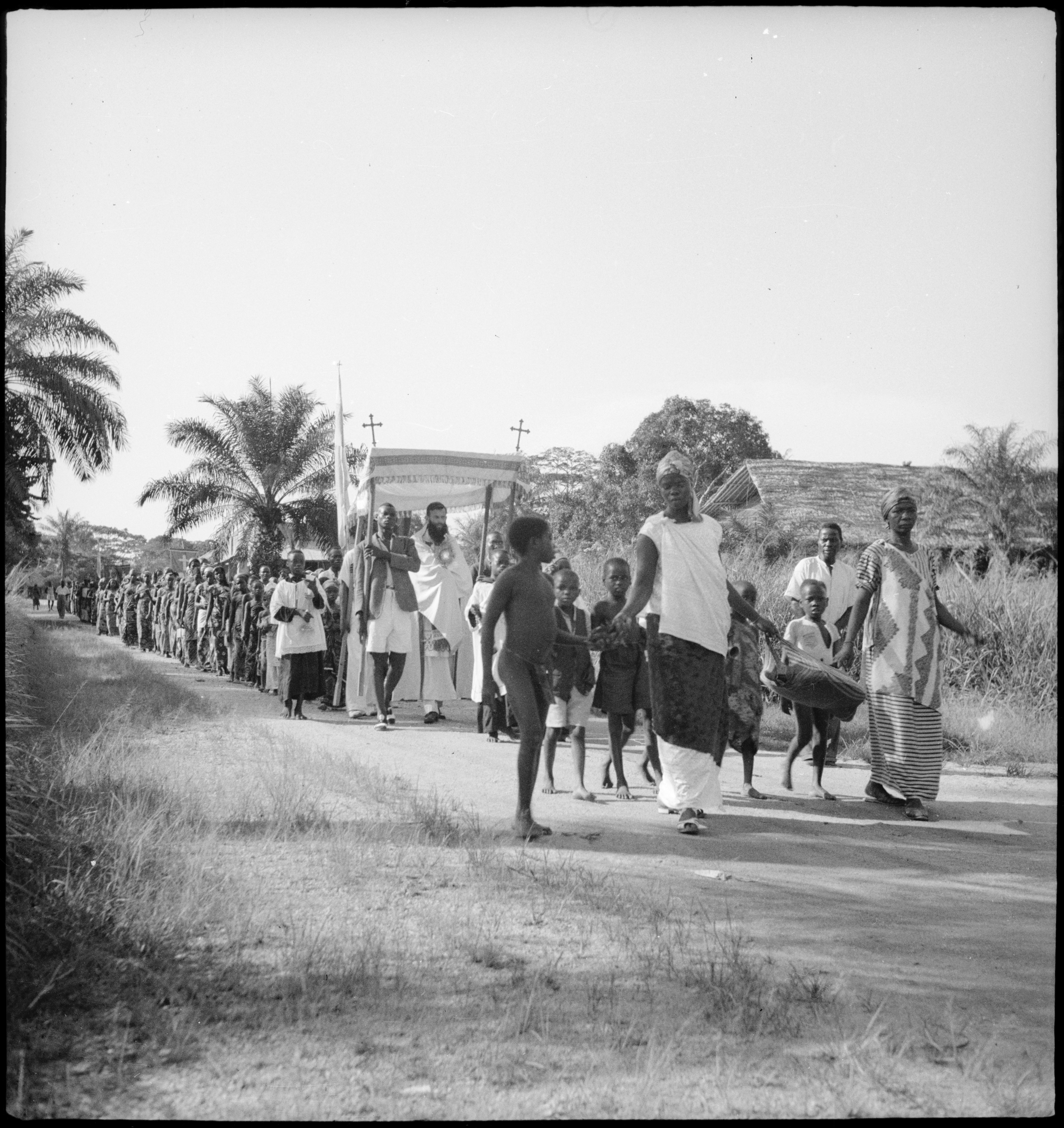 Belgisch-Kongo, Buta: Alltagsszene; Prozessionsumzug durch eine Strasse mit Priester an der Spitze